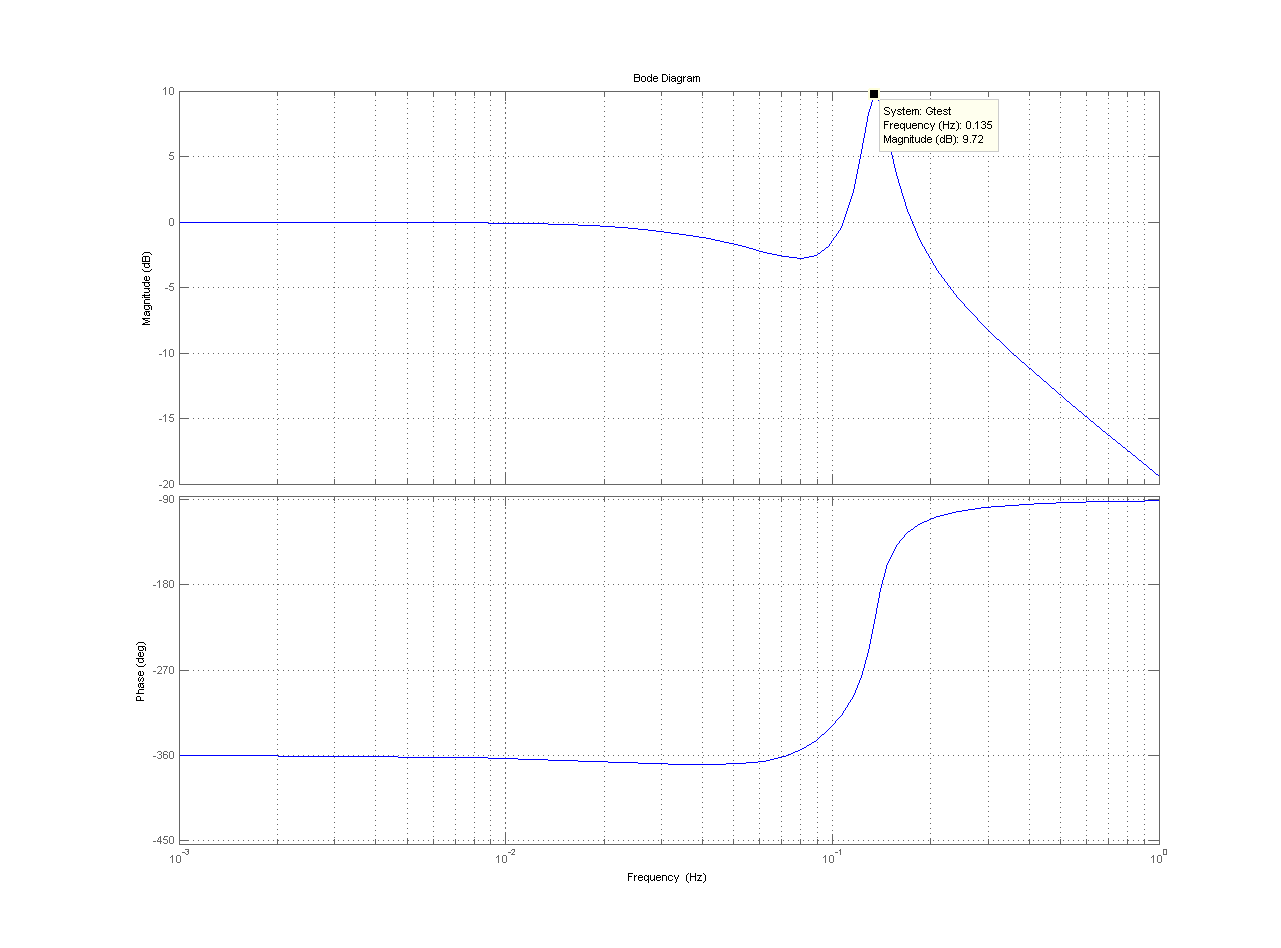 Supremum (H_unendlich-Norm) im Frequenzgang der SISO-Strecke (2s^2+s+1)/(3s^3+s^2+2s+1)